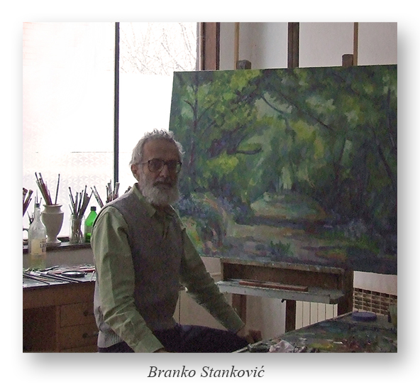 Srpski (latinica): Branko Stanković